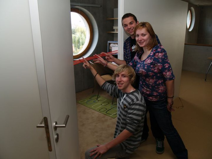 kancelář BT